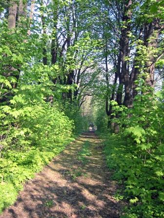 Cmentarz żydowski w Raciborzu - alejka